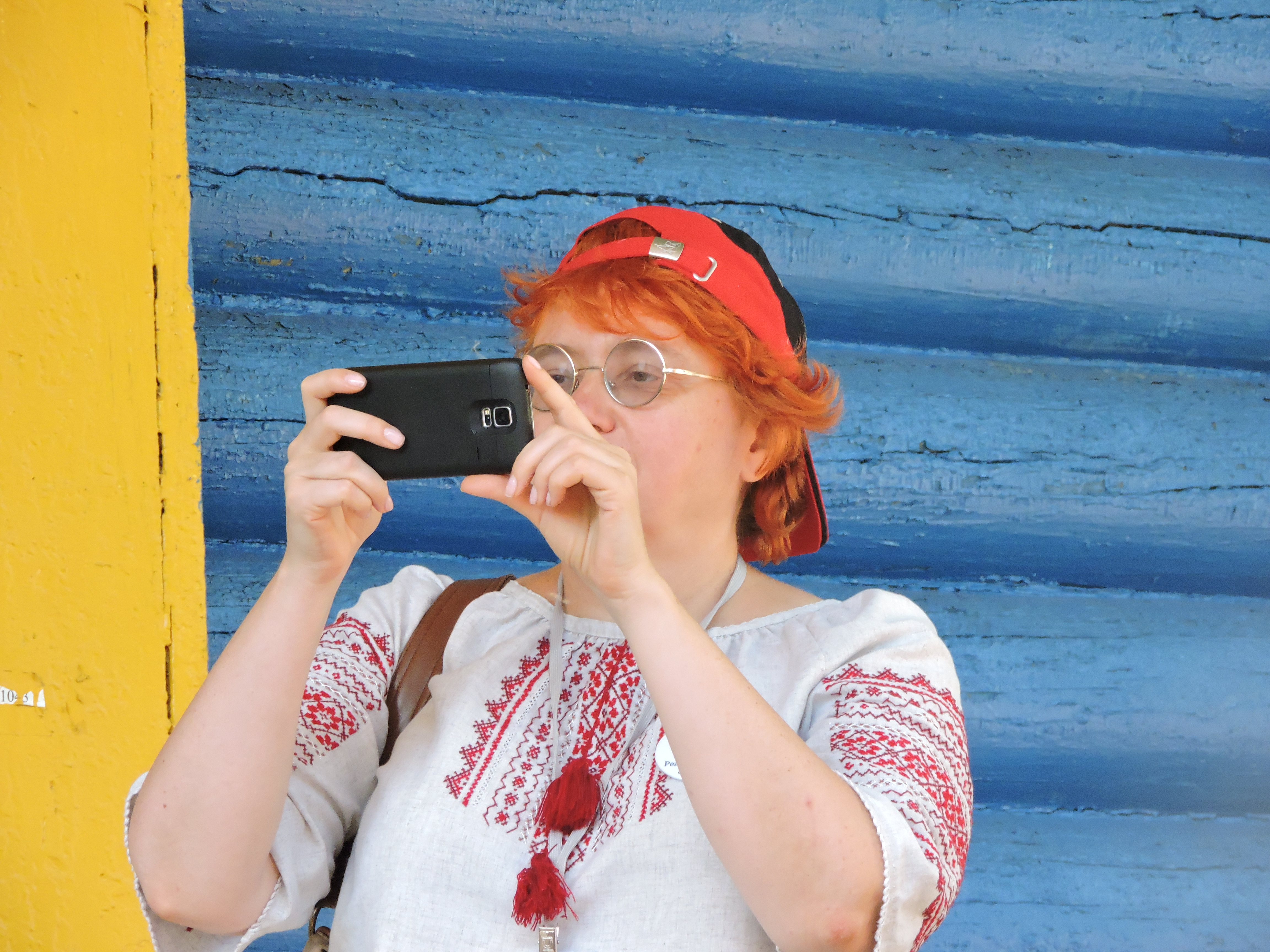 Наталія Зубар під час мистецької акції «Країна руками дітей», проведена у Харківському зоопарку в рамках «Української миротворчої школи»м. Харків, 30 серпня 2015 року.